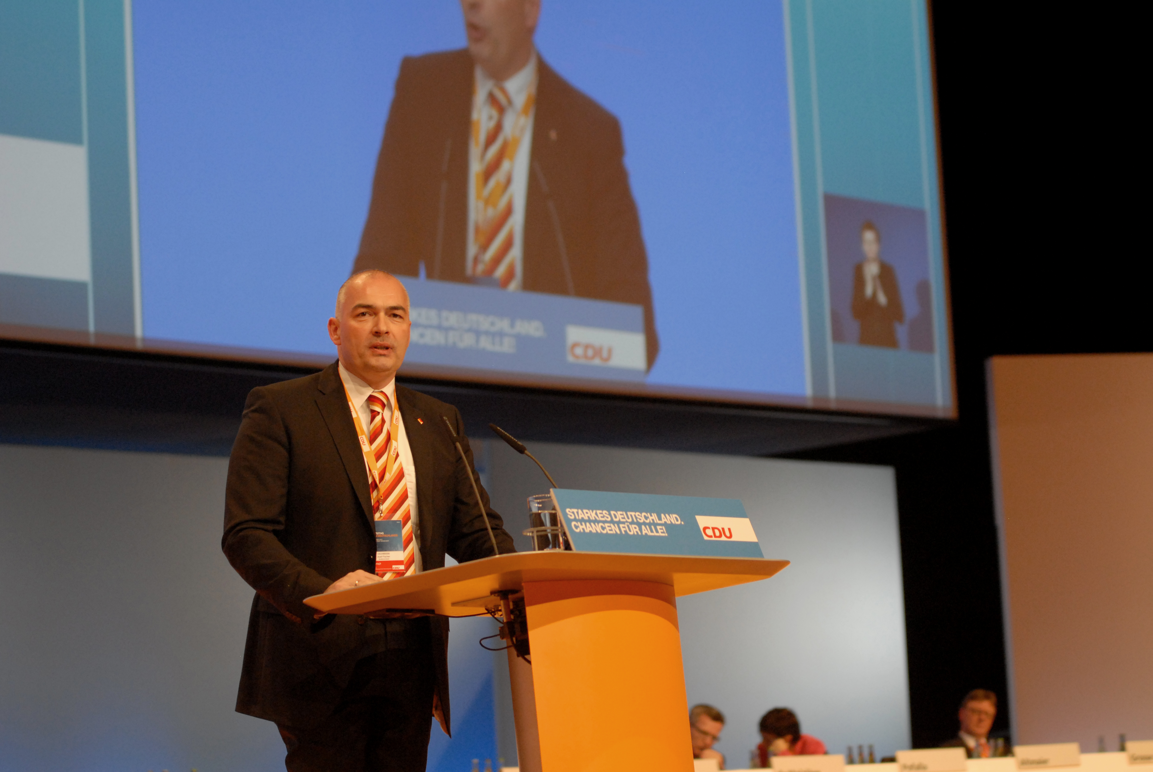 Axel Fischer auf dem CDU-Parteitag